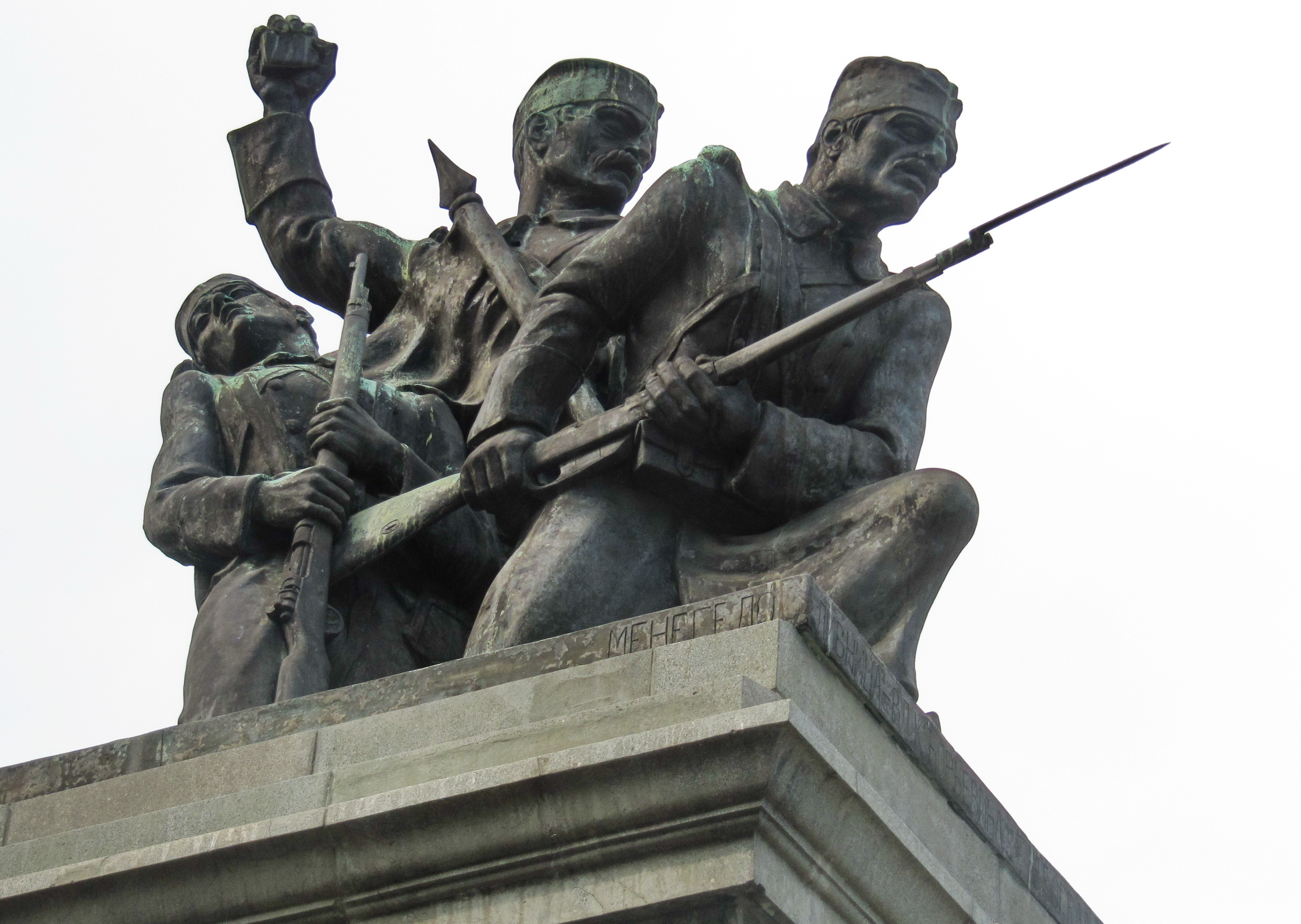 Zaječar, Serbia